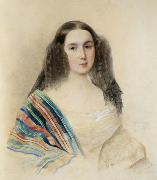 Баронесса Екатерина Николаевна Менгден (1818-1897), дочь Н.А.Муравьева от брака с А.Ф.Козловой.